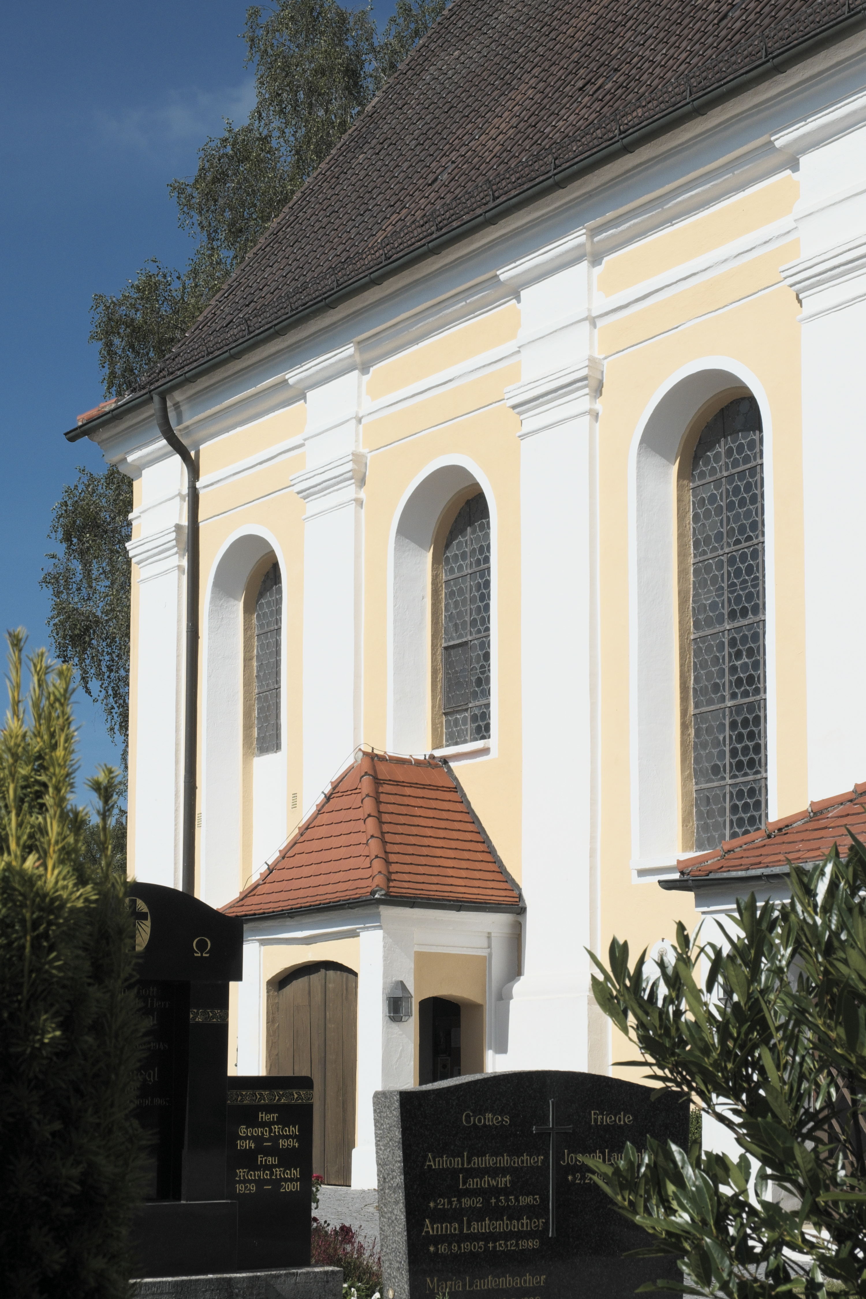 Katholische Pfarrkirche Mariä Himmelfahrt in Epfenhausen (Penzing) im Landkreis Landsberg am Lech (Bayern/Deutschland)